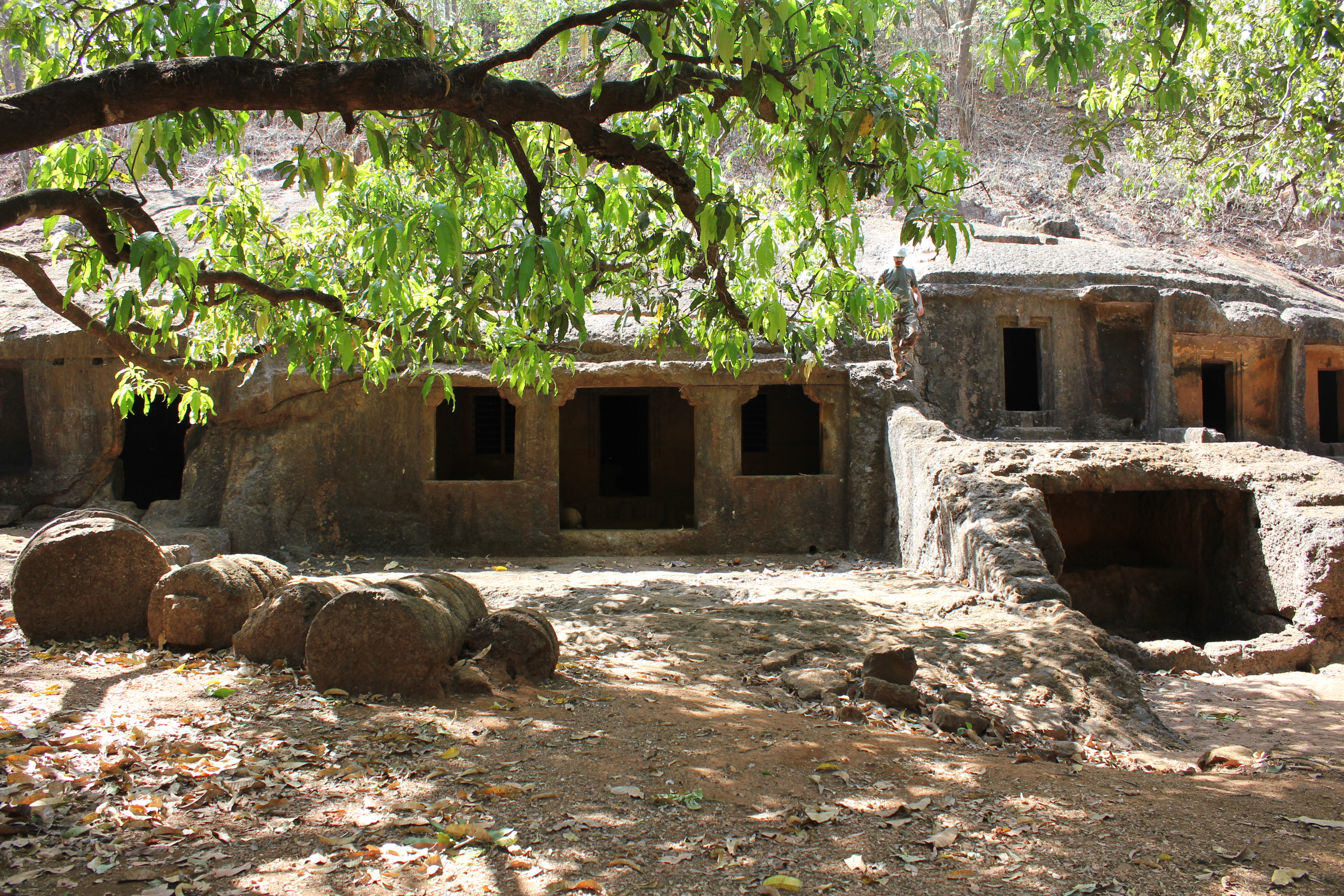 Panhalekaaji caves